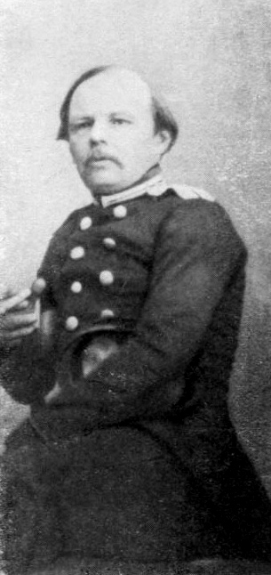 Dostoyevsky in 1858